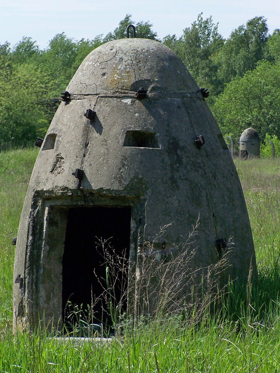 Splitterschutzzelle - bunkier jednoosobowy, Fabryka Benzyny Syntetycznej w Policach